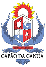 Brasão da cidade de Capão da Canoa, Estado de Rio Grande do Sul, Brasil. Coat of arms of Capão da Canoa city, in Brazil.